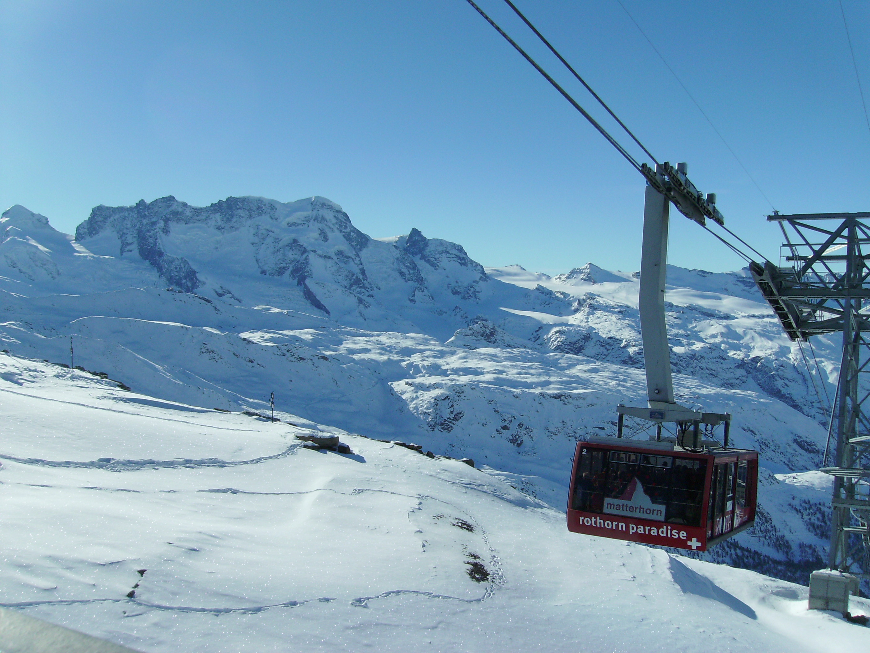 La Funivia del Rothorn Paradise. Sullo sfondo i Breithorn.